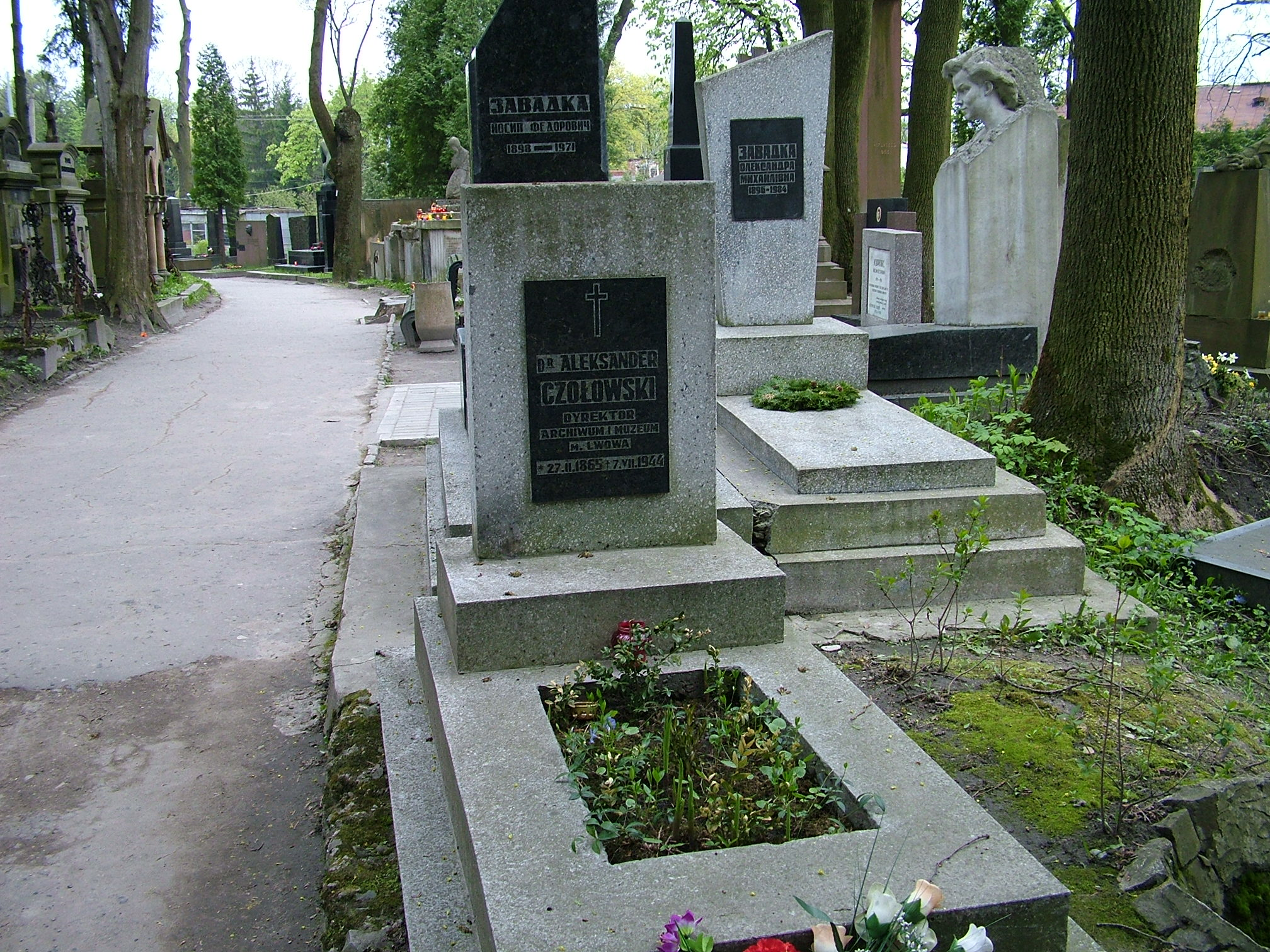 Grób Aleksandra Czołowskiego na cmentarzu Łyczakowskim we Lwowie. Autor: Stanisław Kosiedowski, 1 maja 2005.